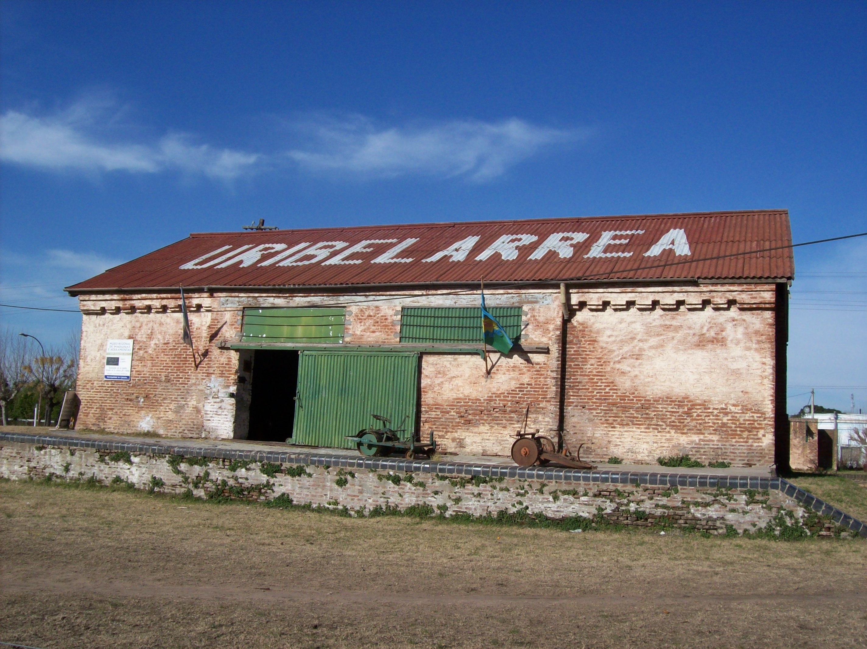 Museo de Herramientas "Leopoldo Rizzi" en un antiguo galpón de la estación Uribelarrea del Ferrocarril Roca, en el partido de Cañuelas, provincia de Buenos Aires, Argentina.